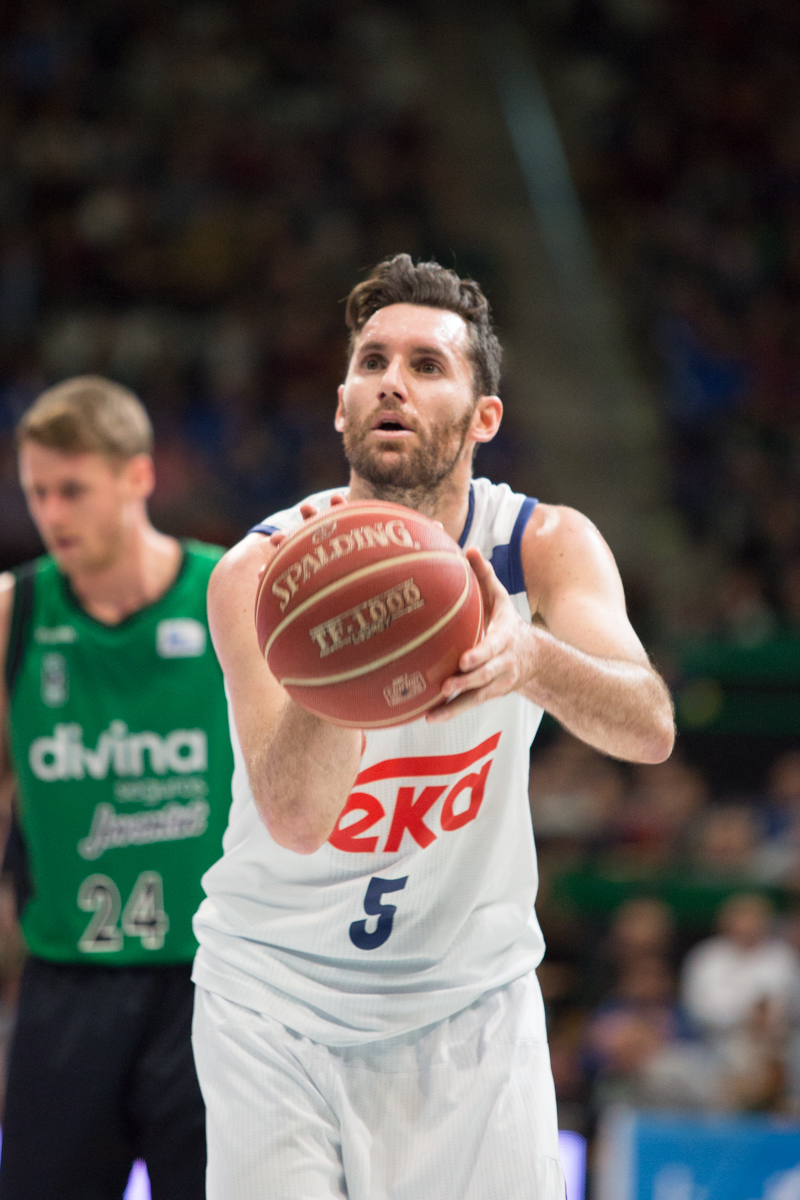 Rudy Fernández con la camiseta del Real Madrid en un partido en el Olímpico de Badalona durante la temporada 2016-17.